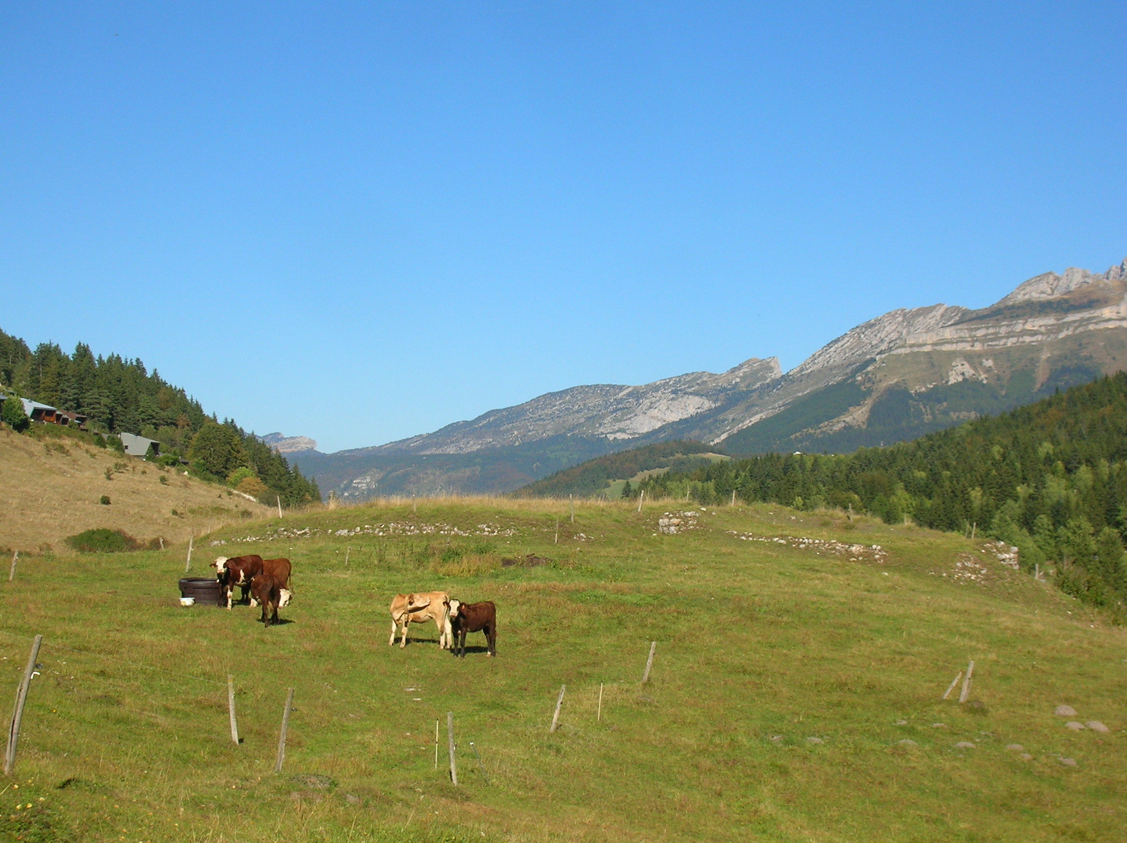 motte et château fort, Corrençon-en-Vercors, Isère, AuRa, France.